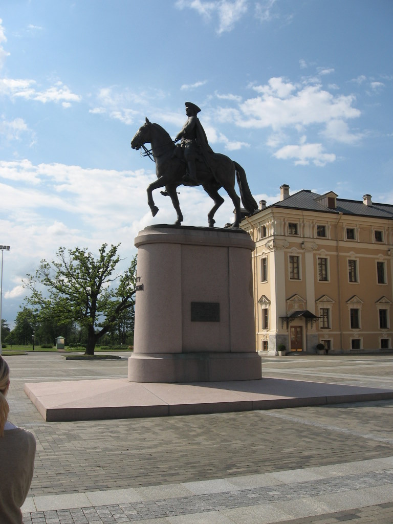 Konstantinovsky palace